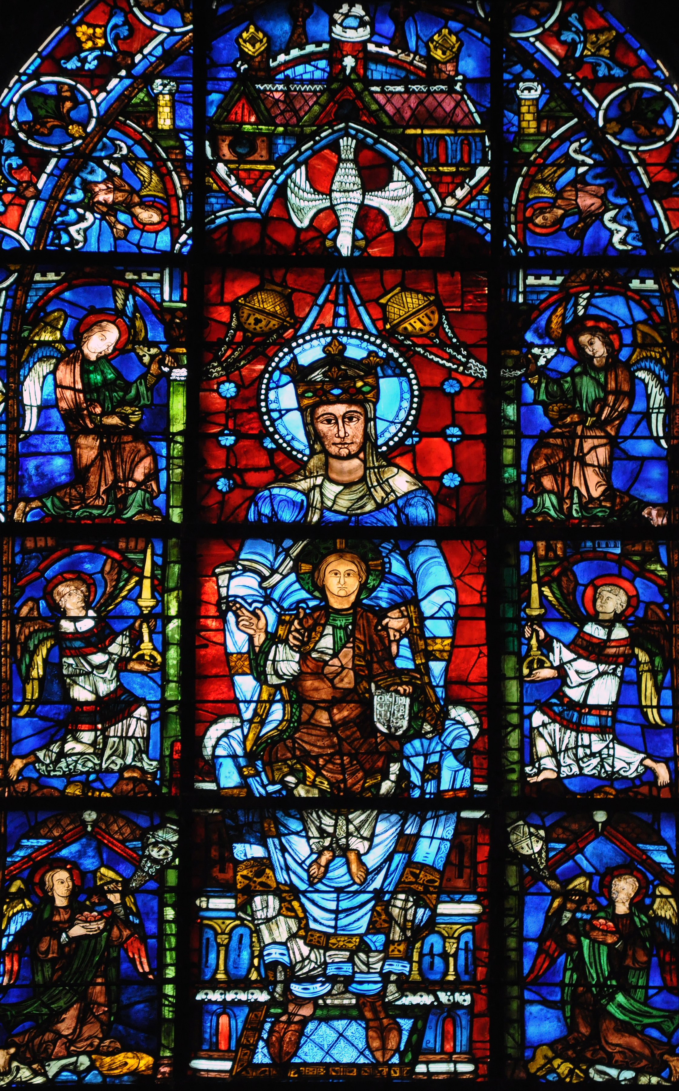 Notre-Dame de la Belle Verrière (12ème siècle pour la Vierge à l'Enfant sur fond rouge, 13ème siècle pour les anges). Cathédrale Notre-Dame de Chartres.